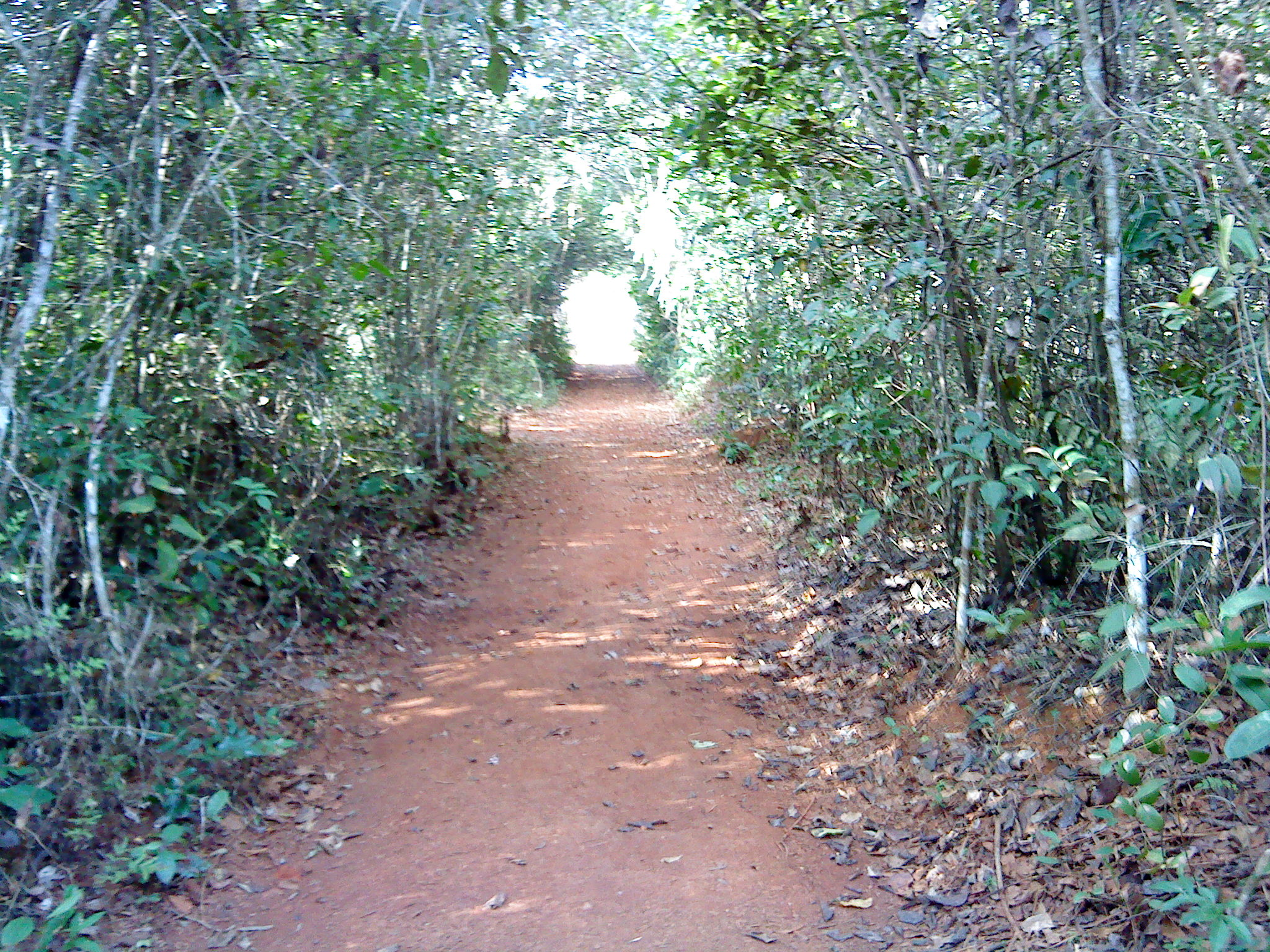 Trilha coberta pela vegetação característica do parque sumidouro.